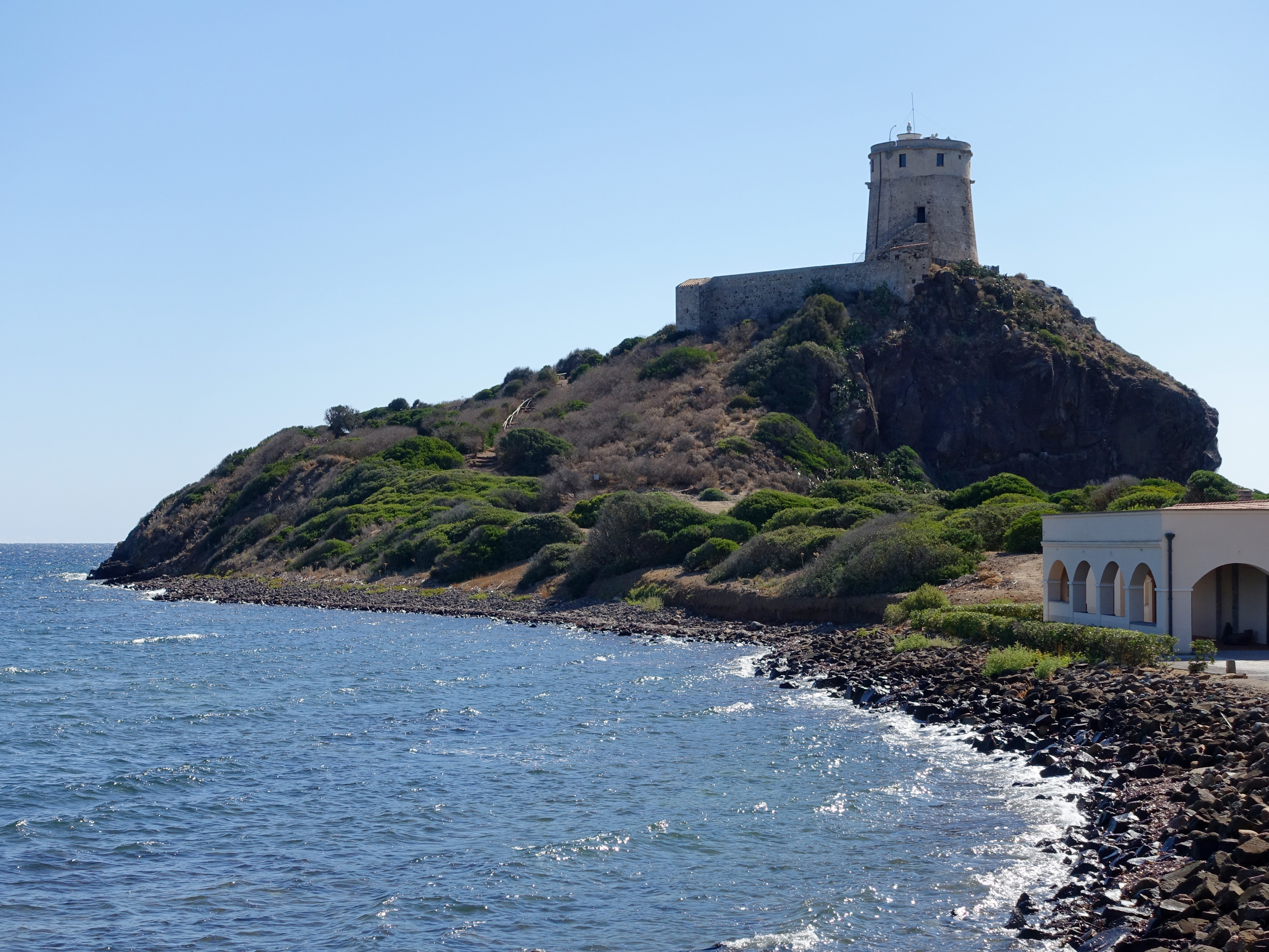 Torre del Coltellazzo oder Torre di Sant’Efisio bei Nora, Gemeinde Pula, Sardinien, Italien